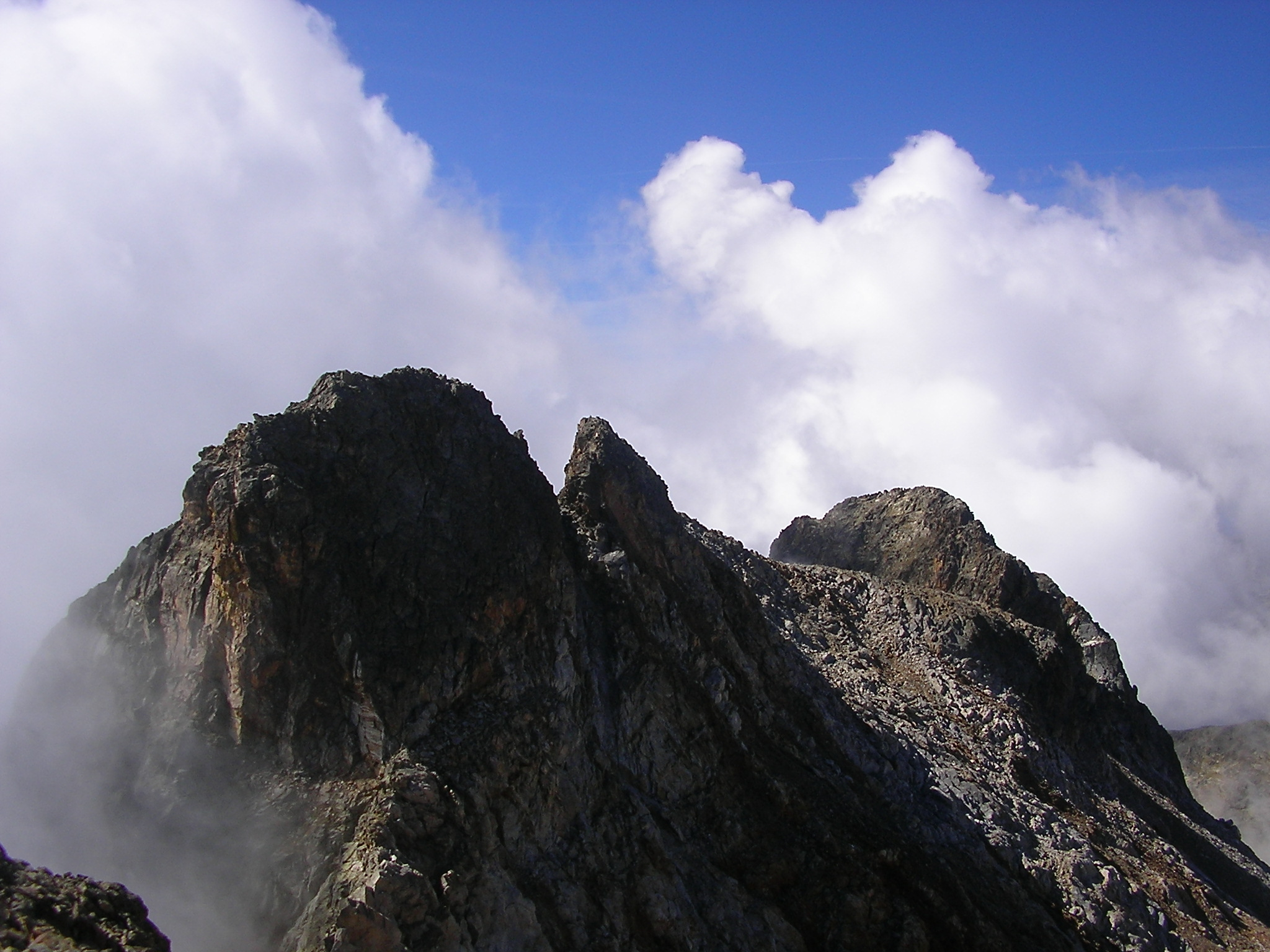 G80_Propria_Monte Matto Cima Centrale